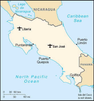 Localizacion de los 2 principales aeropuertos de Costa Rica